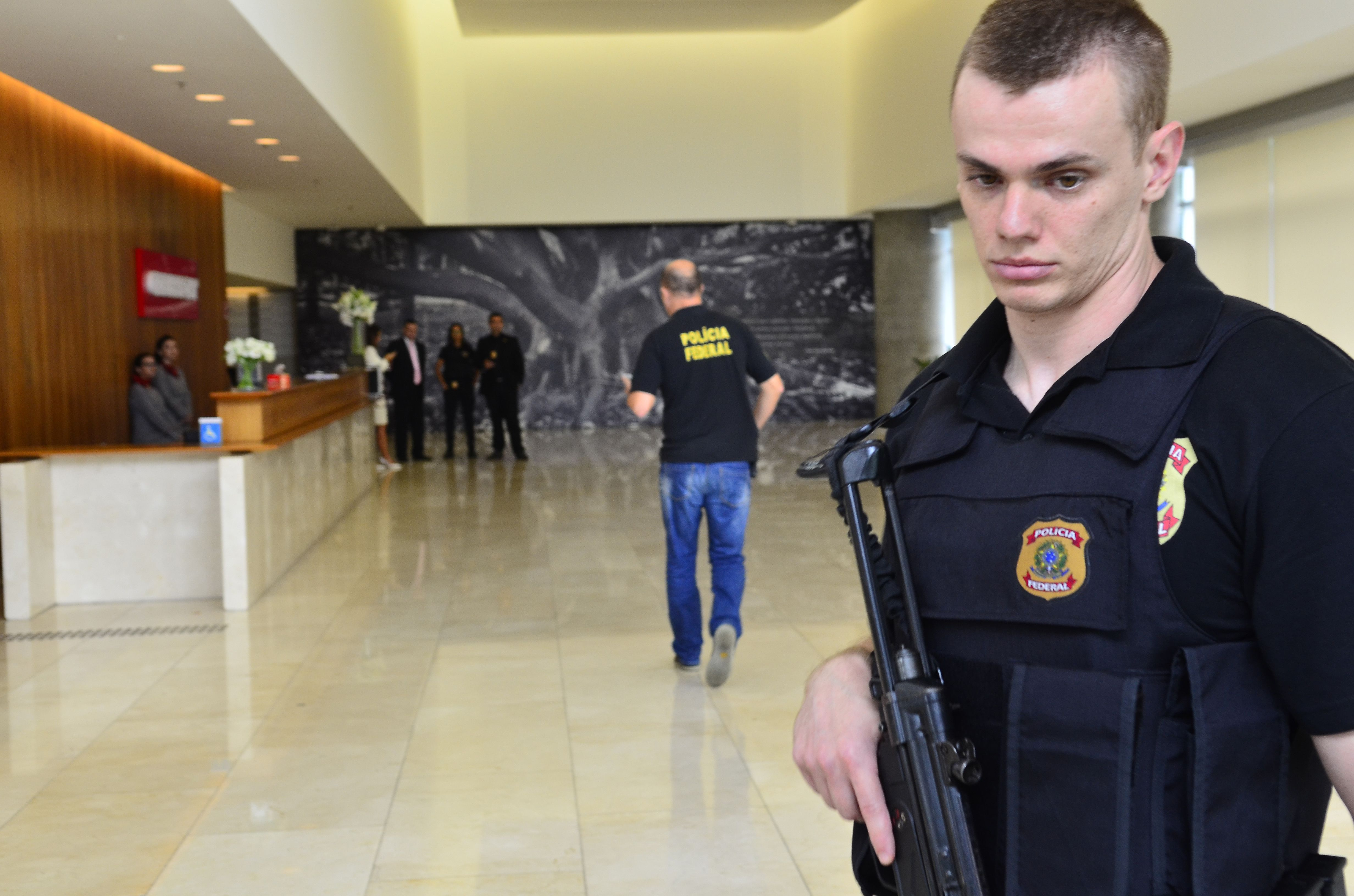 Polícia Federal ao chegar na sede da Construtora Odebrecht, durante as atividades da Operação Acarajé, 23ª fase da Operação Lava Jato.